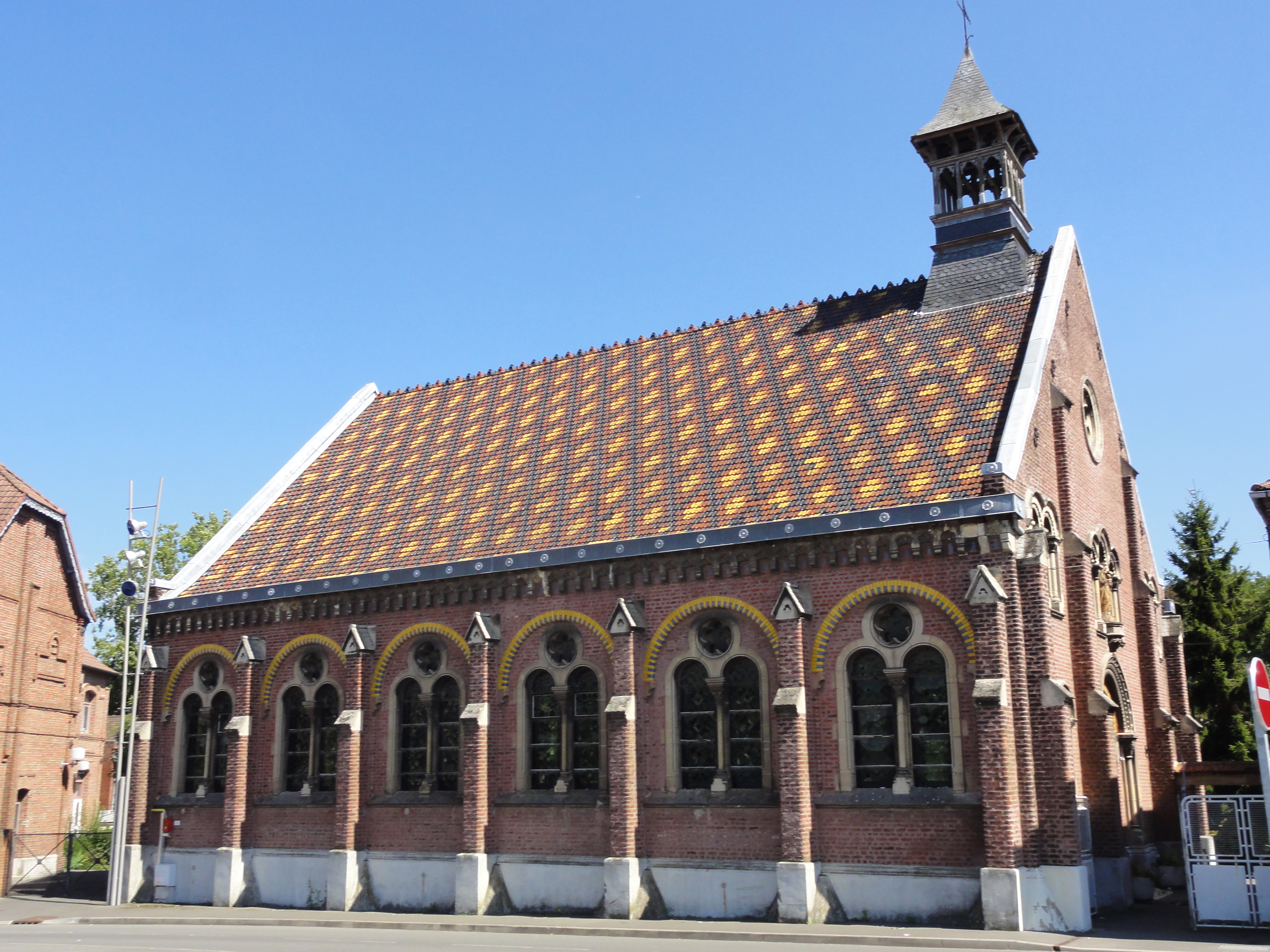 Chapelle Sainte-Barbe des cités de la Fosse n° 1 - 1 bis de la Compagnie des mines de Bruay, Bruay-la-Buissière, Pas-de-Calais, Nord-Pas-de-Calais, France.